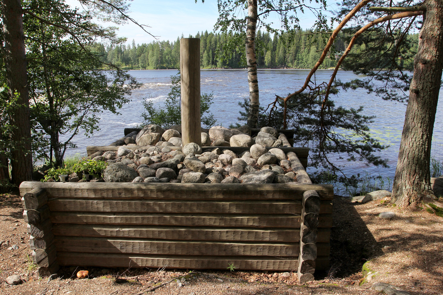 Uitonaikainen kiviarkku Kapeenkosken rannalla Äänekoskella.